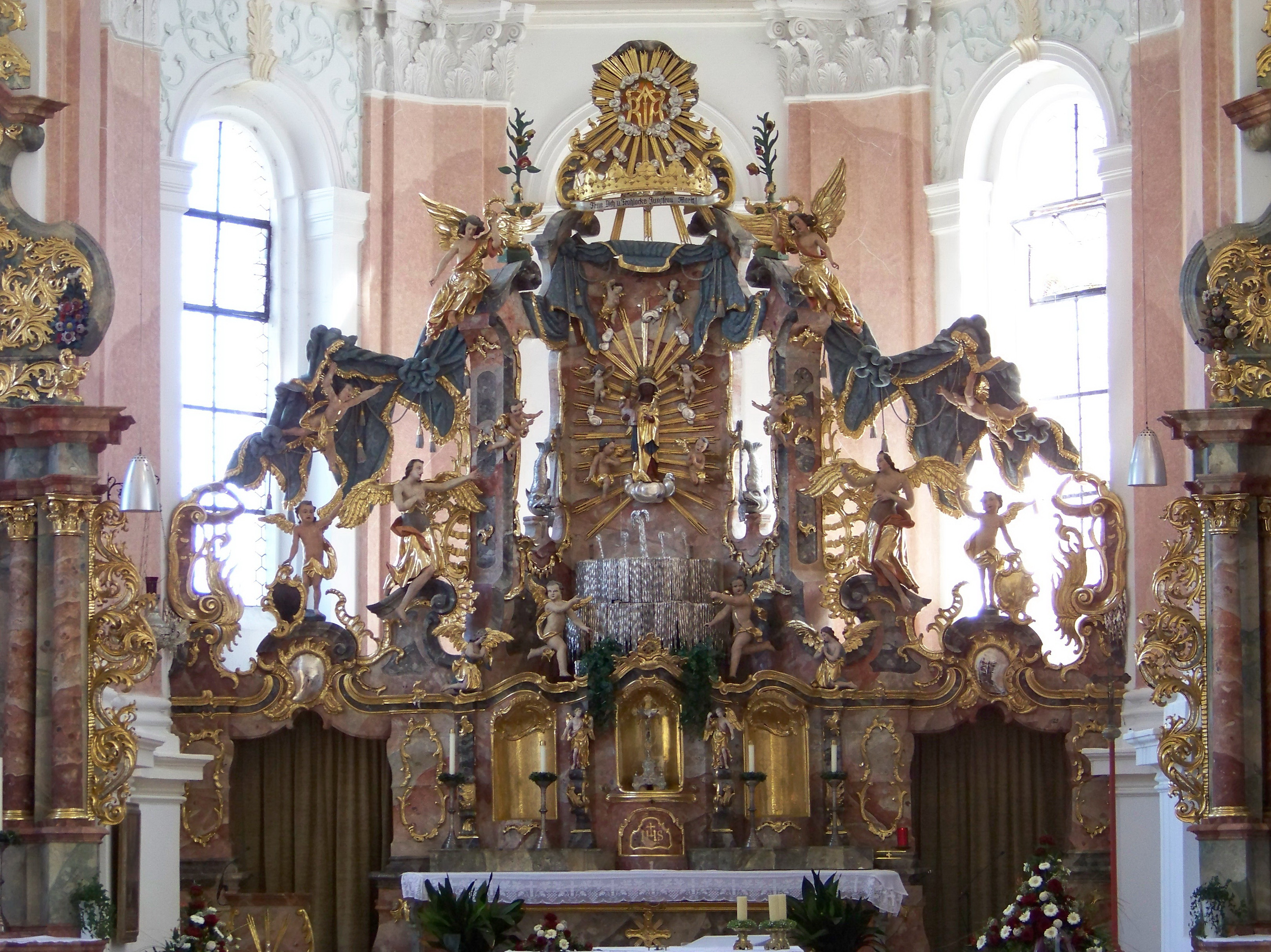 Hohenthann, Heiligenbrunn. Wallfahrtskirche Mariä Heimsuchung. Barockbau von Hans Widtmann, 1712/14; mit Ausstattung. Herzstück des Rokokoaltars aus dem Jahre 1760 ist eine Kopie des Gnadenbildes von Altötting, darunter eine nach allen Seiten überlaufende Quelle. Die viersäuligen Seitenaltäre aus dem Spätbarock stammen aus dem Jahr 1734.